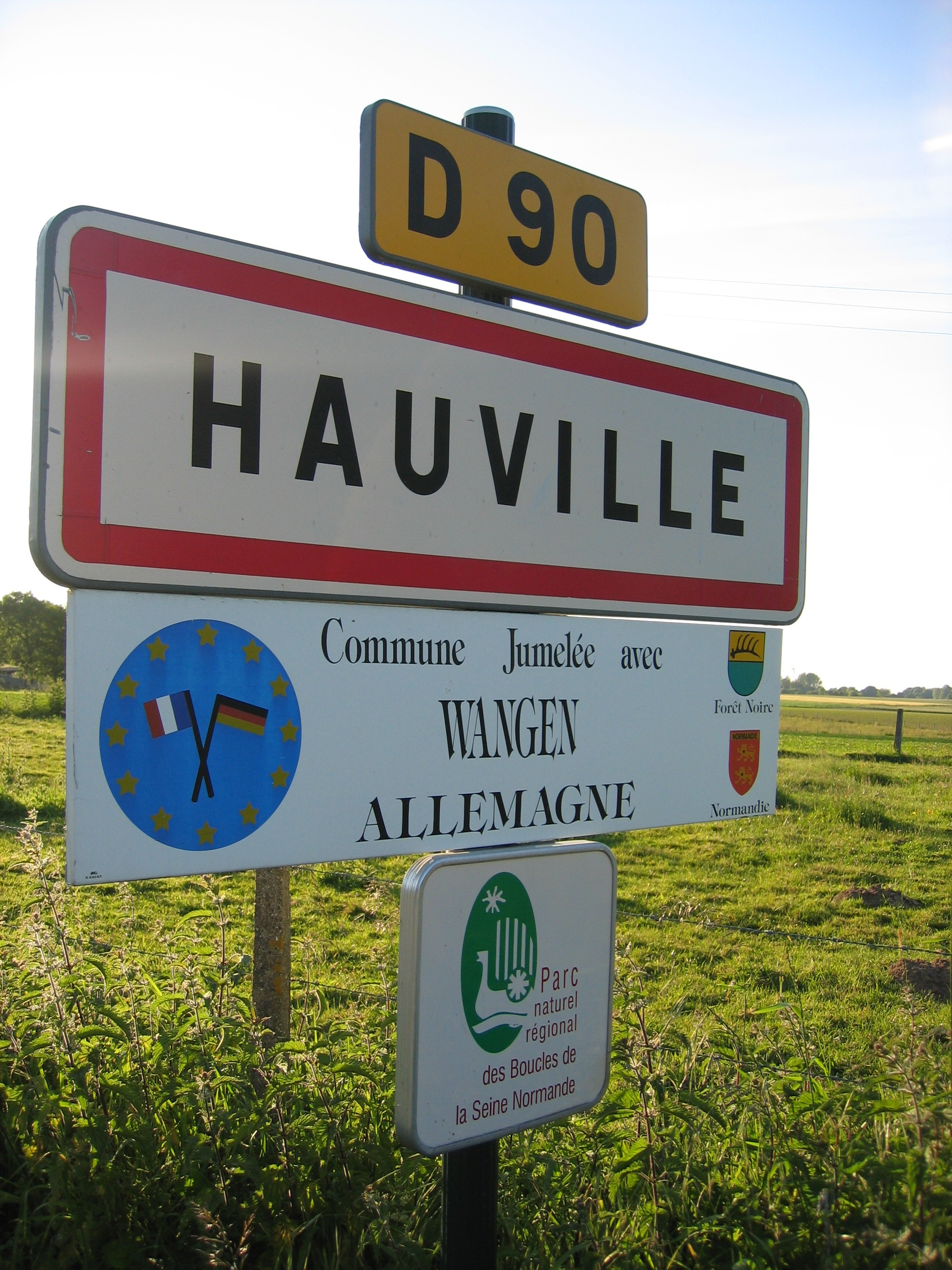 Photo de l'entrée d'Hauville (27), prise en juin 2005. Sawyer